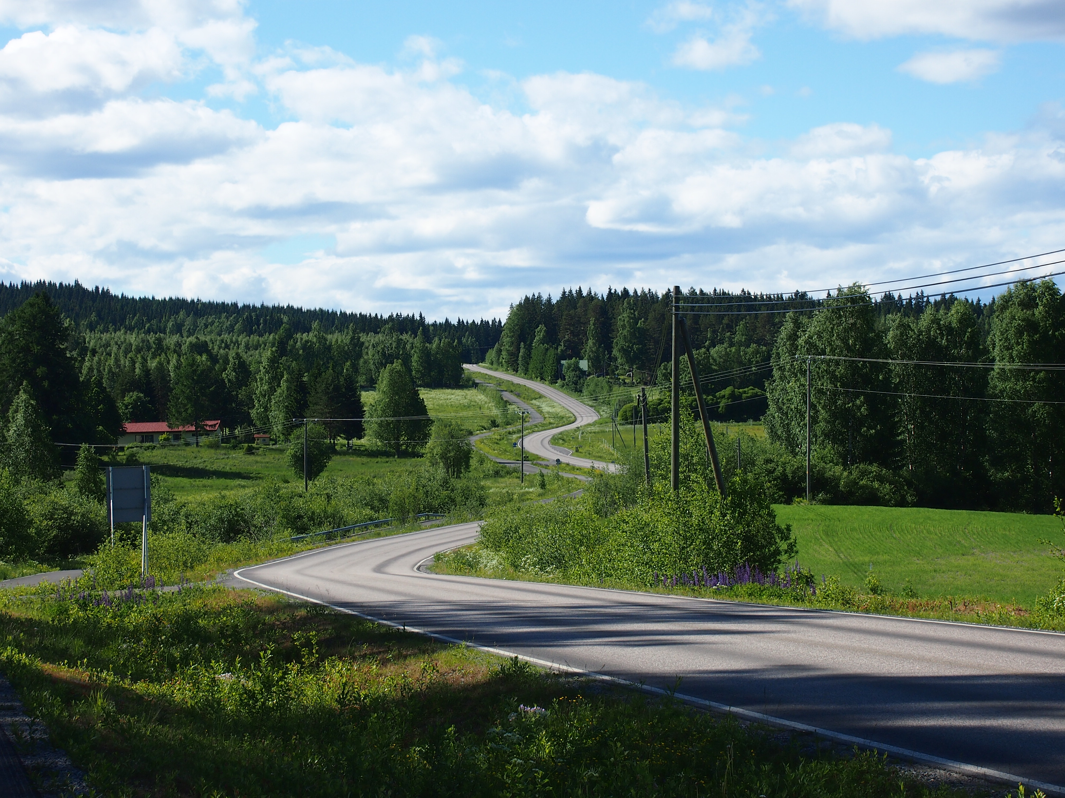 Yhdystie 5550 Kuopion Haminalahdessa.